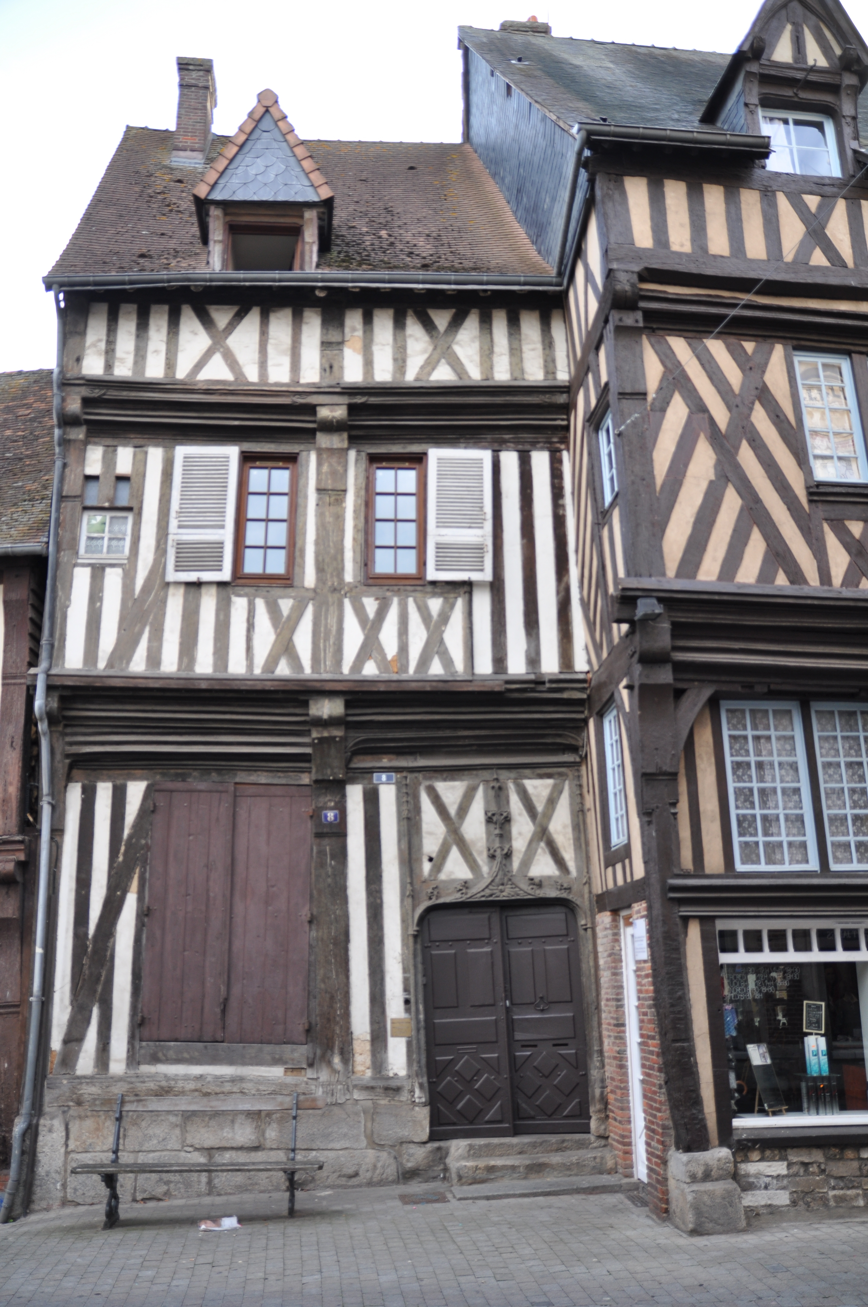 Immeuble normand avec une façade en bois typique situé au 8 rue Auguste Le Prévost à Bernay